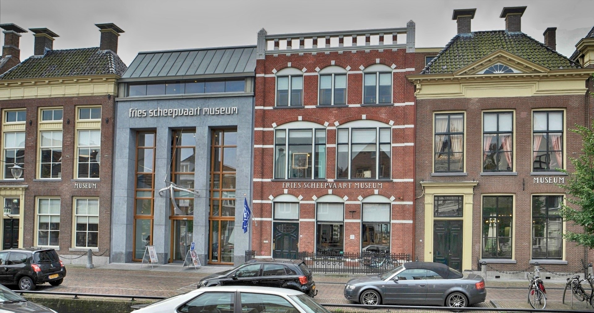 Fries Scheepvaart Museum, Kleinzand 12-18 te Sneek